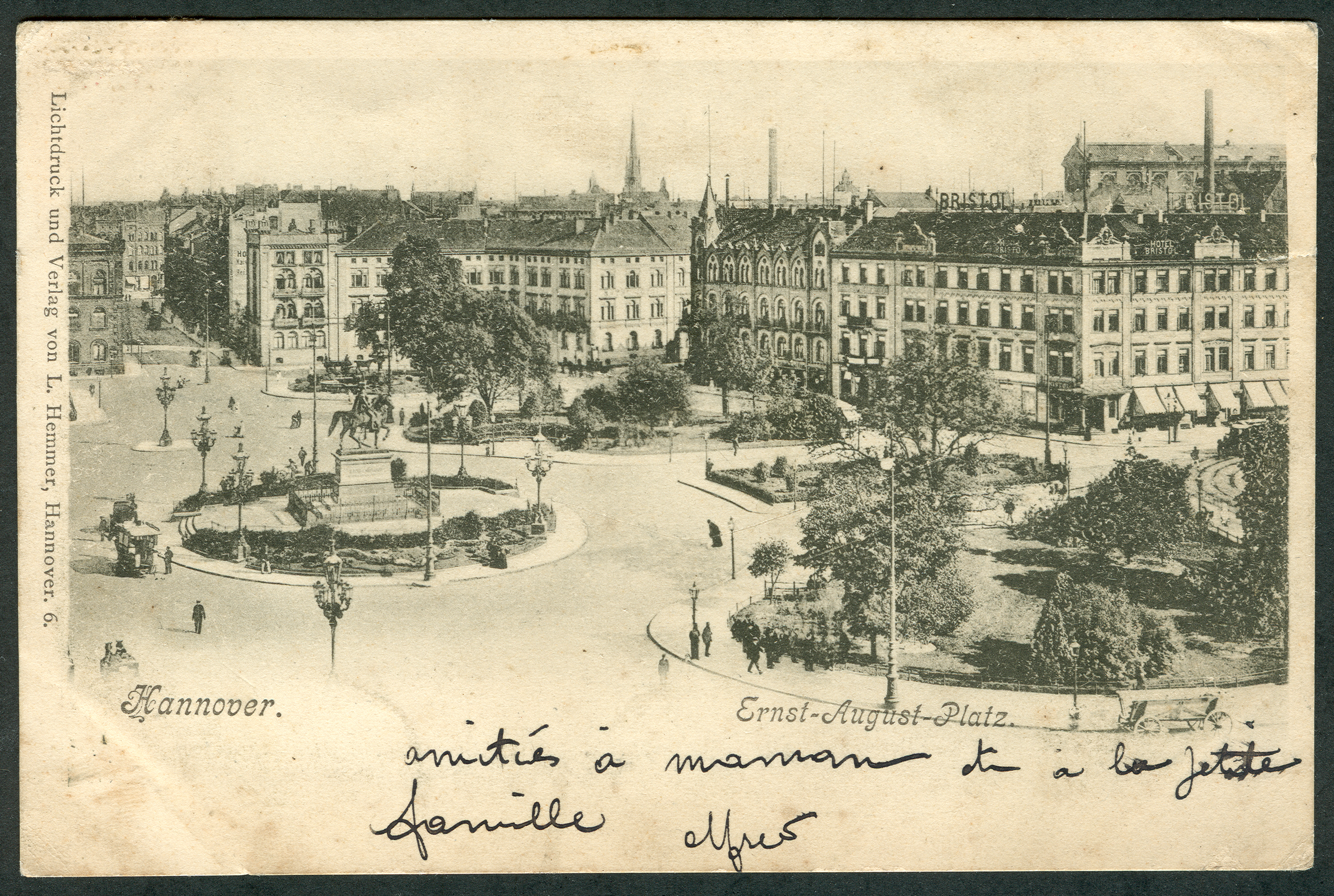 Bildseite der Ansichtskarte Nummer 6 von Ludwig Hemmer. Hemmer fotografierte, druckte im Lichtdruckverfahren und verlegte seine Ansichtskarten unter eigenen Namen.